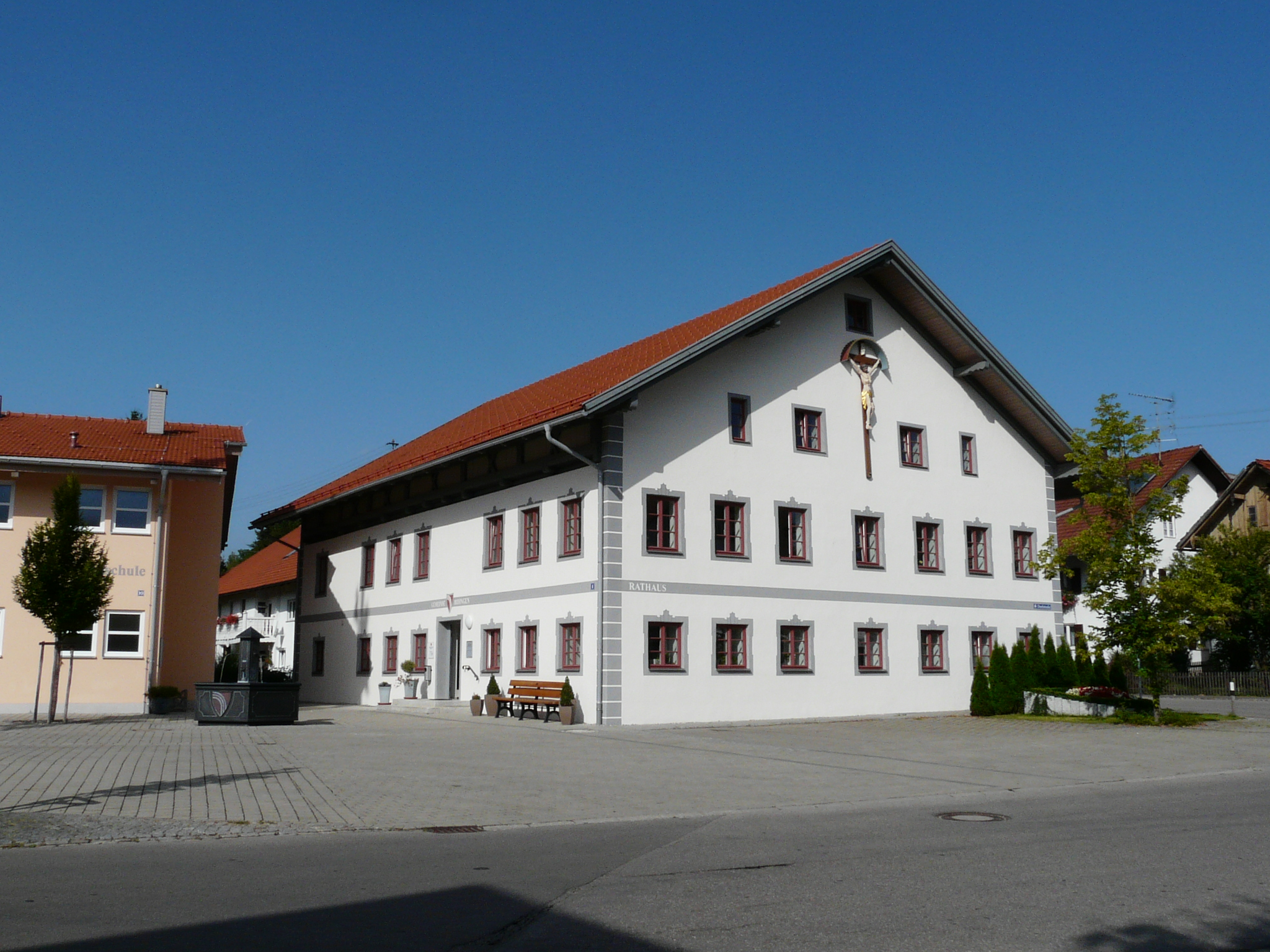 Dorfstr. 8, Bidingen